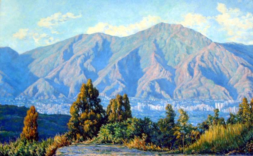 Pintura del Cerro Avila por Luis Alvarez de Lugo